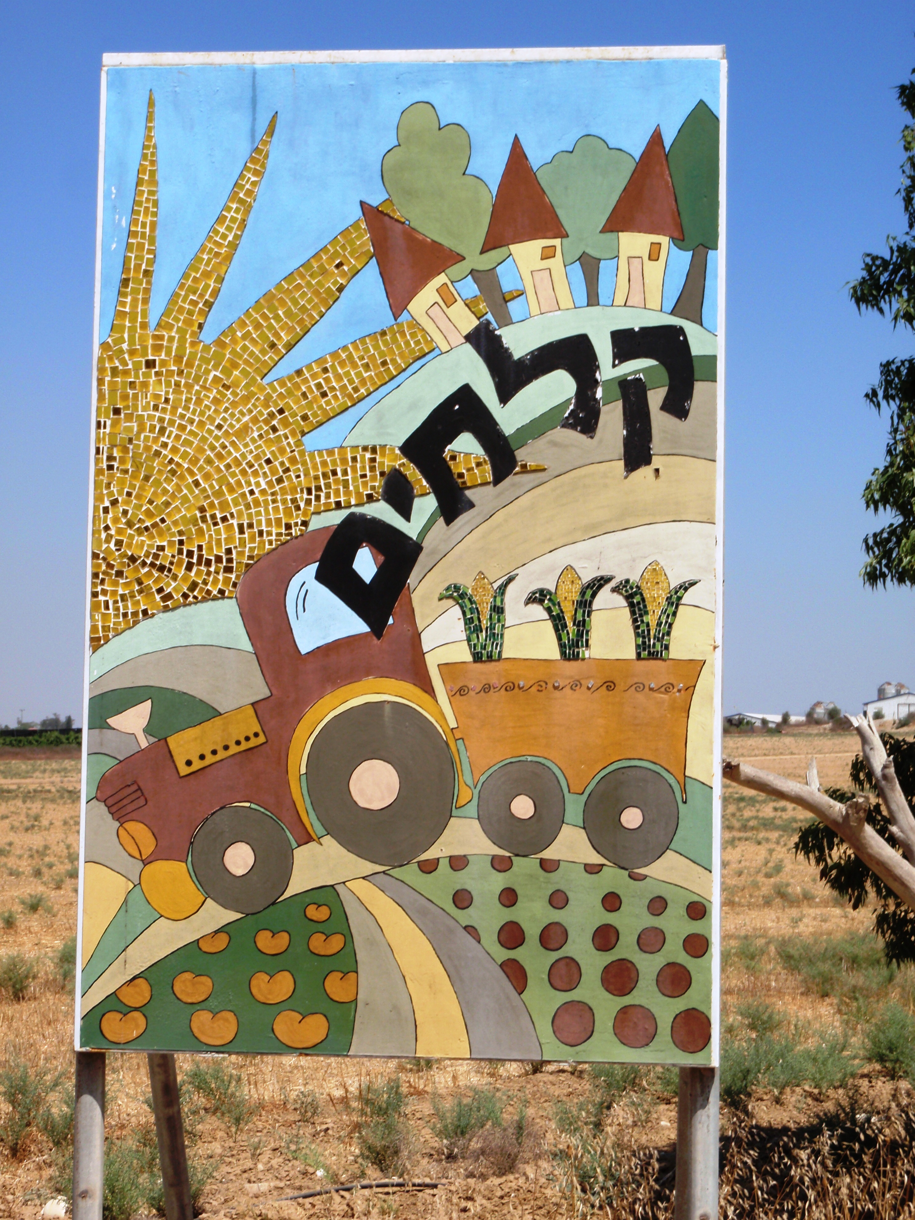 Moshavim קלחים שלט הכניסה למושב